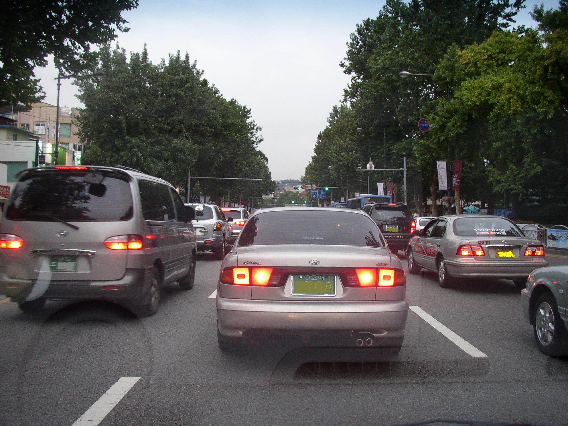 DaeHakro